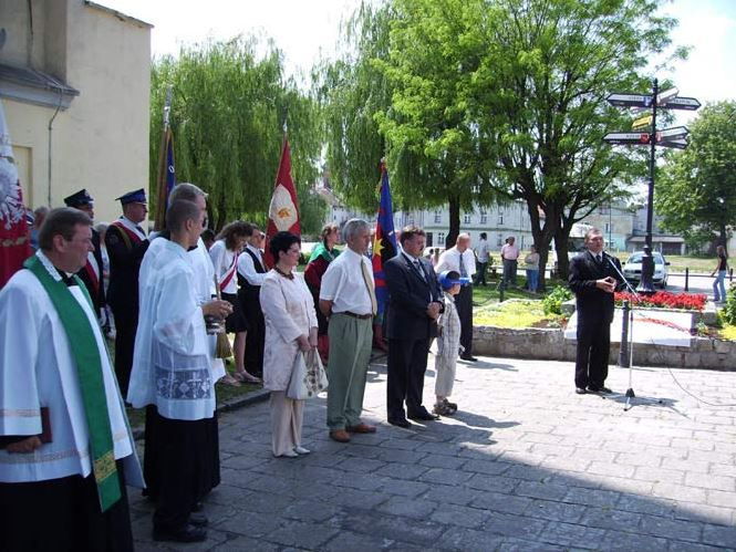 Odsłonięcie tablicy pamiątkowej odrestaurowania Wieży Ratuszowej w Rynku w Bierutowie - przemówienie burmistrza Grzegorza Michalaka